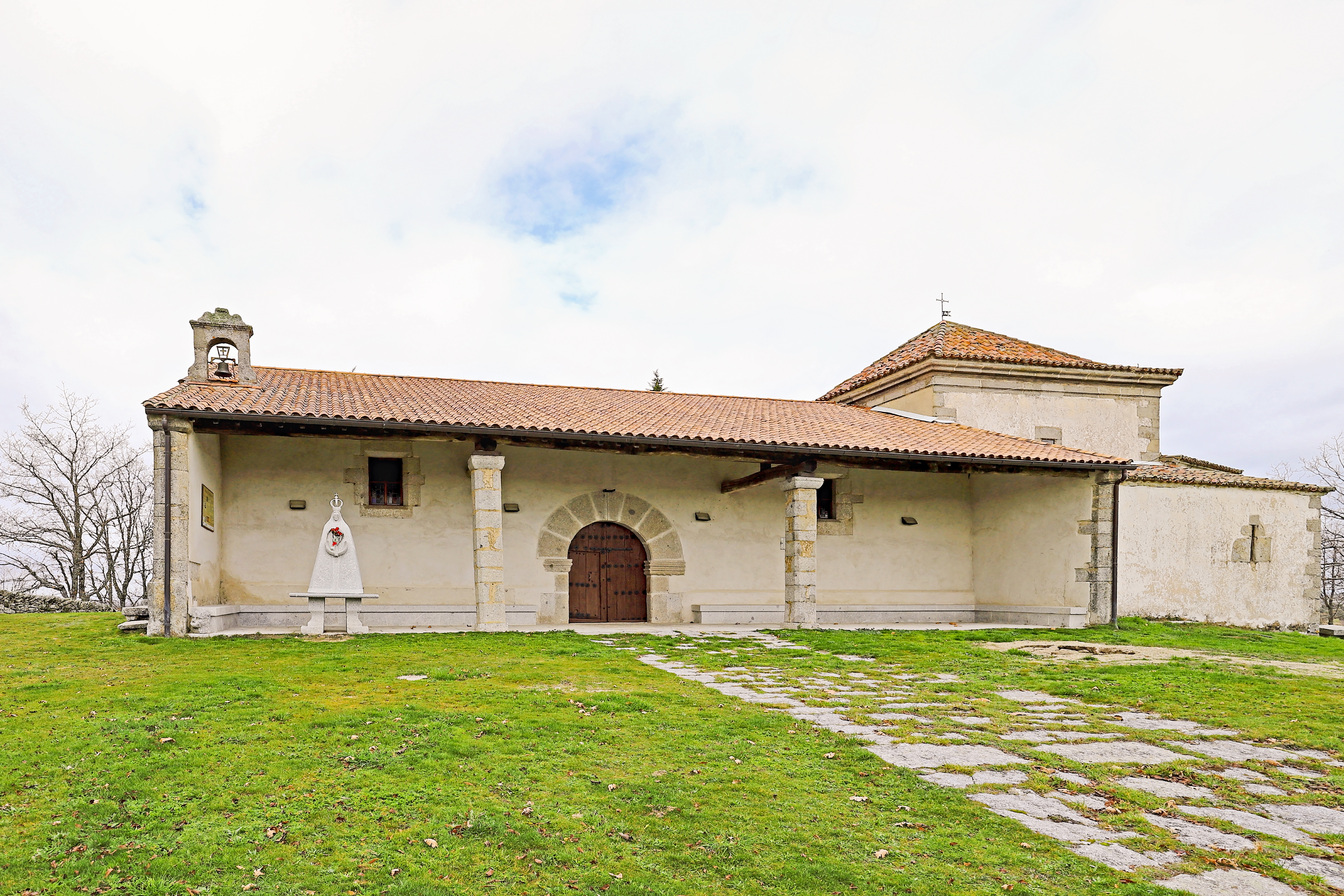 Los Santos es un municipio que pertenece a la comarca de Entresierras, provincia de Salamanca.